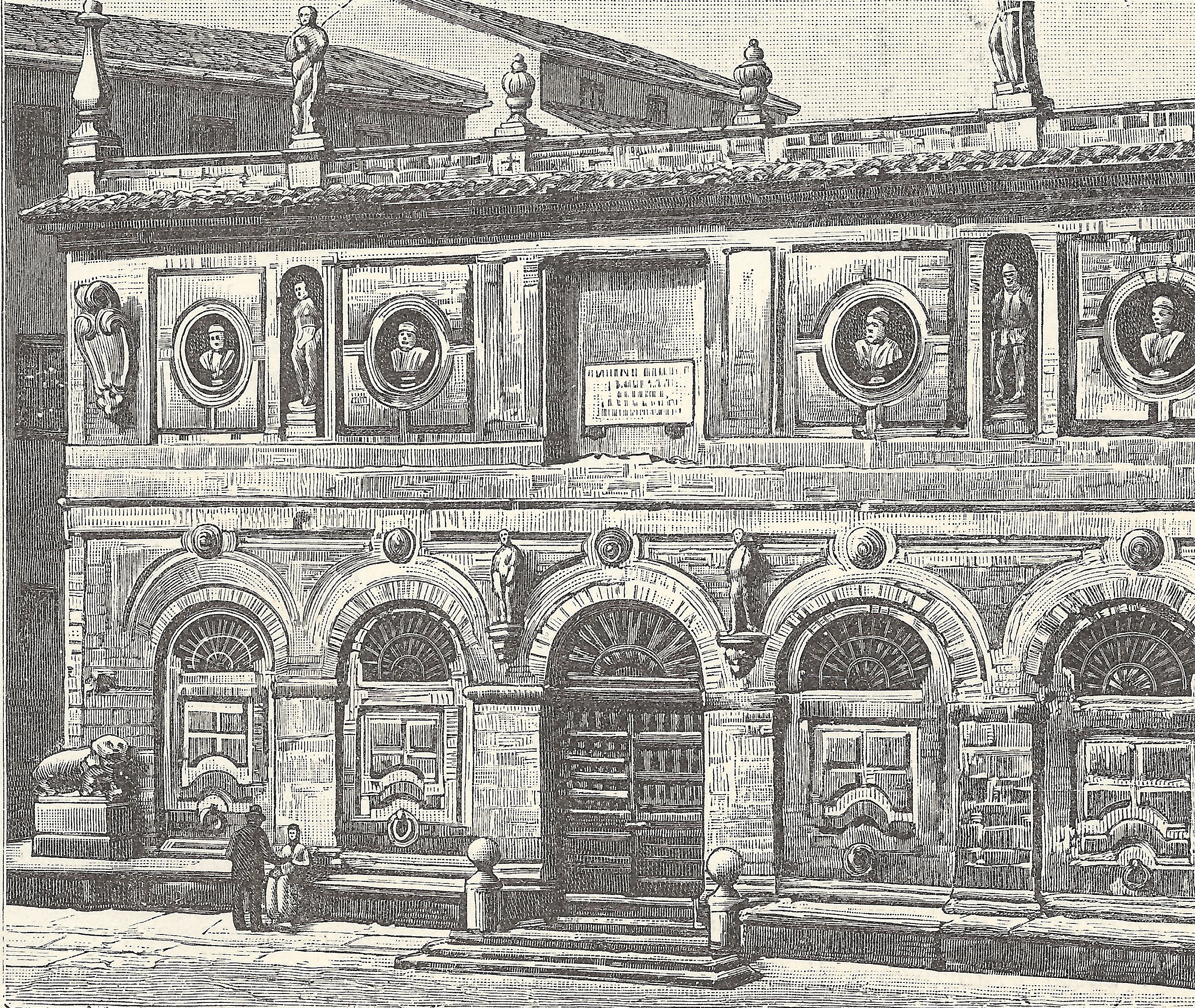 Avellino: palazzo della dogana (incisore anonimo 1898).